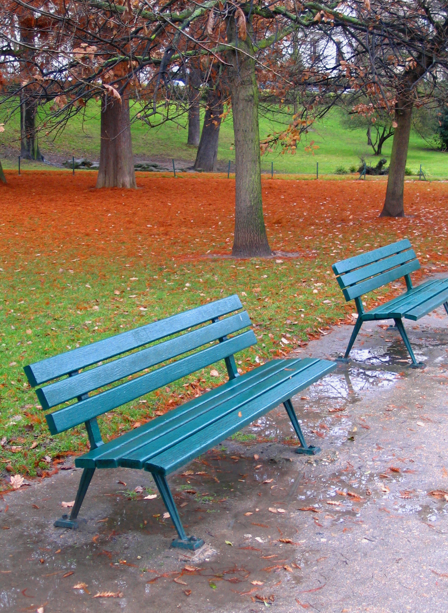 Paysage près du lac de Saint-Mandé - Bois de Vincennes - Paris XIIe arrondissement, France.